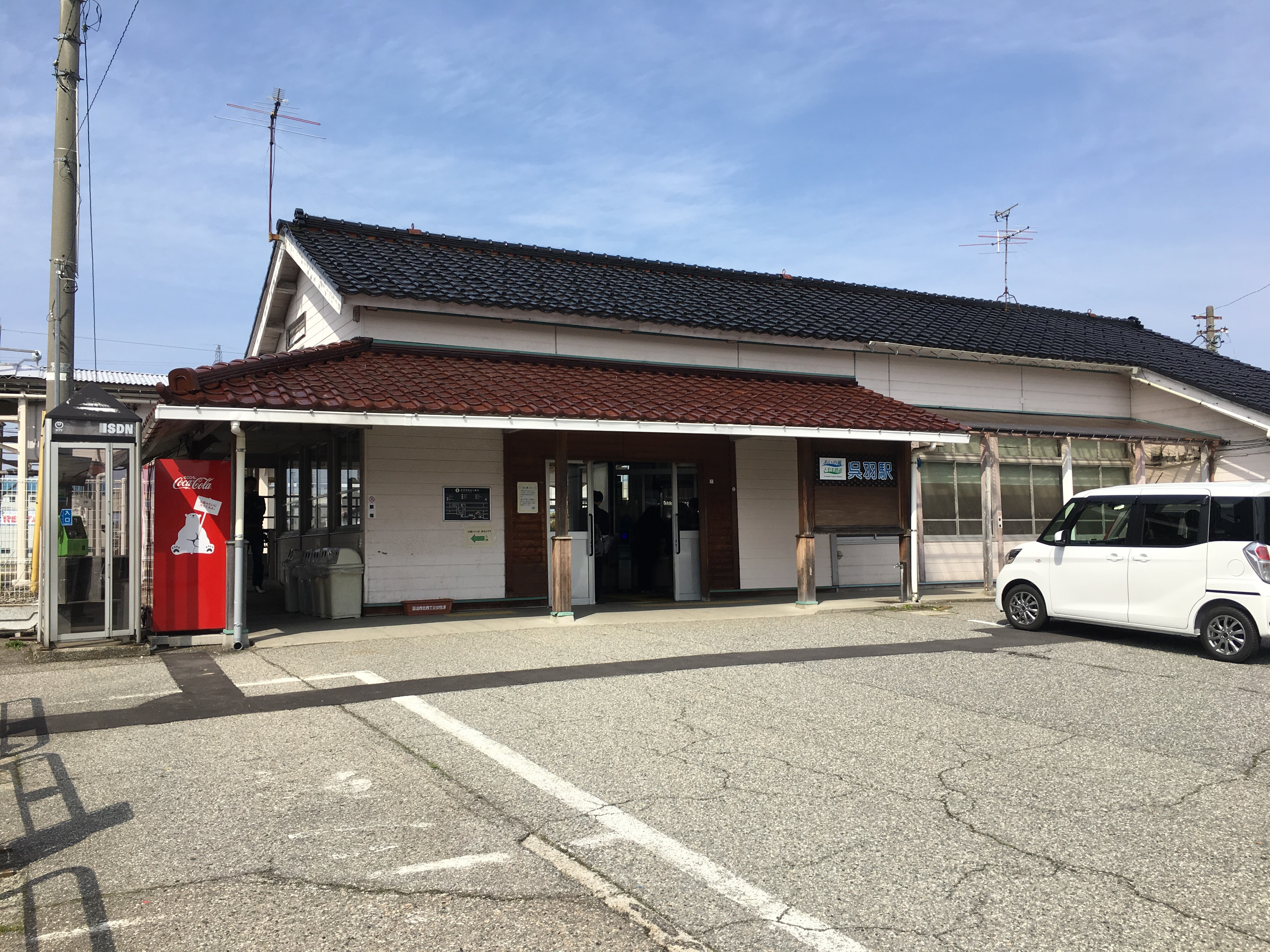 呉羽駅駅舎